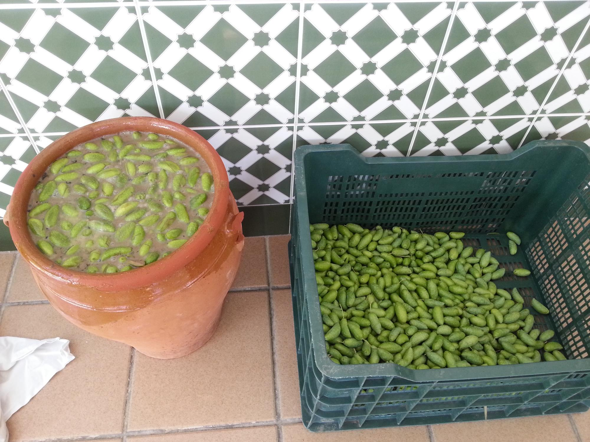 Aceitunas de cornezuelo recién recogidas en una caja, y recién machacadas y puestas a macerar en una vasija de cerámica.